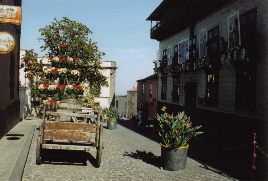 Weihnachtssterne und Strelitzien in La Orotava, Teneriffa. / Beschreibung: Aufnahme vom Dezember 2003.